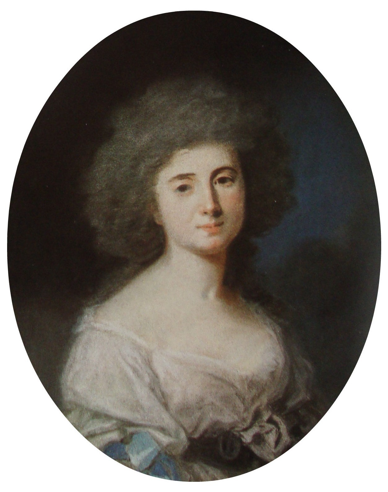 Портрет ошибочно идентифицирован, как портрет Софьи Константиновны Витт (во 2-м браке Потоцкой). На пастели изображена морганатическая супруга последнего польского короля Станислава Августа Понятовского Эльжбета Грабовская (урожденная Elżbieta Szydłowska). Сходная с этим портретом миниатюра находится в Краковском национальном музее.